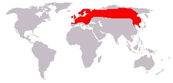 Sciurus vulgaris, Bewerking afbeelding: Afbeelding_(kaart).JPG